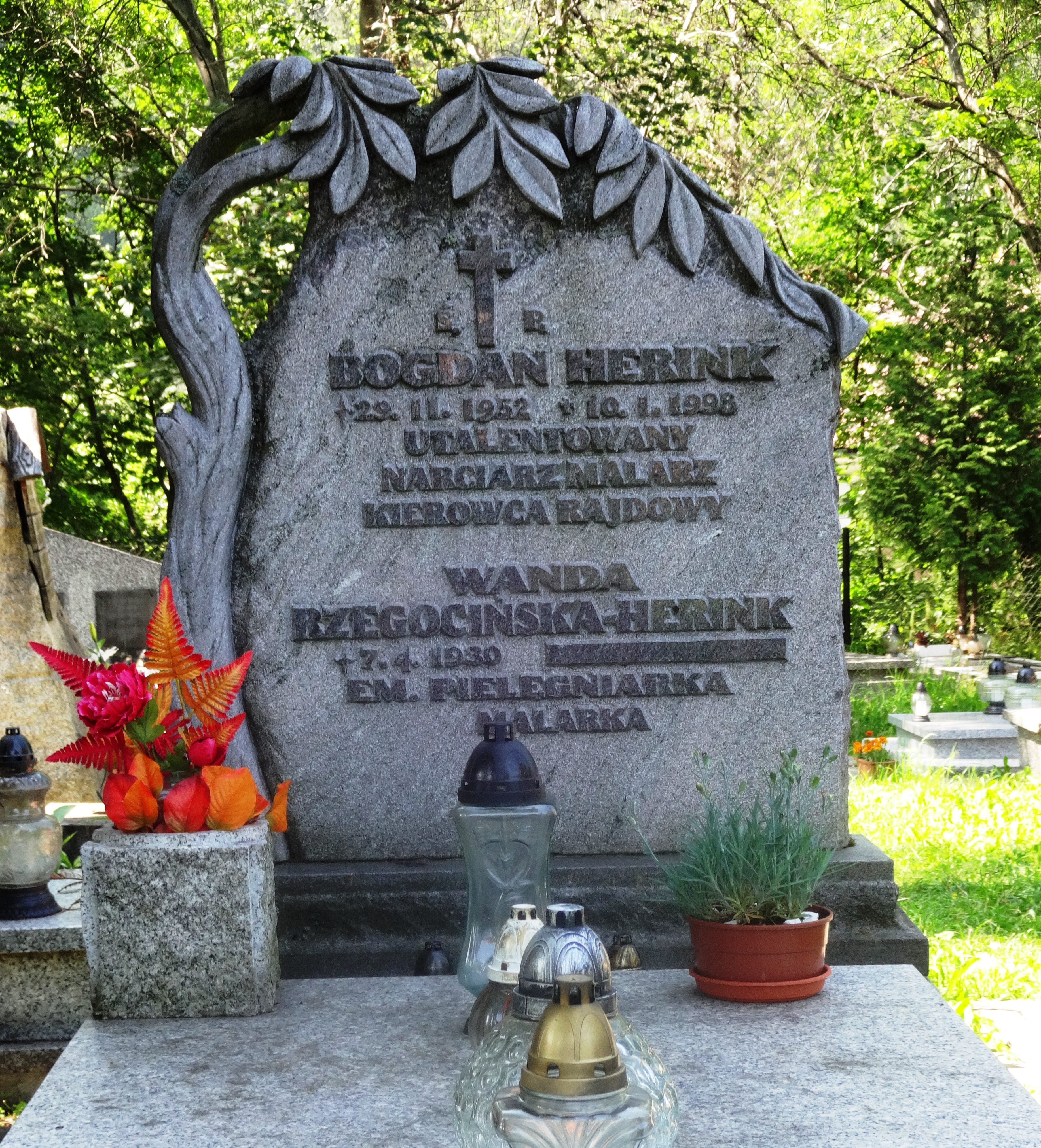 New Cemetery in Zakopane